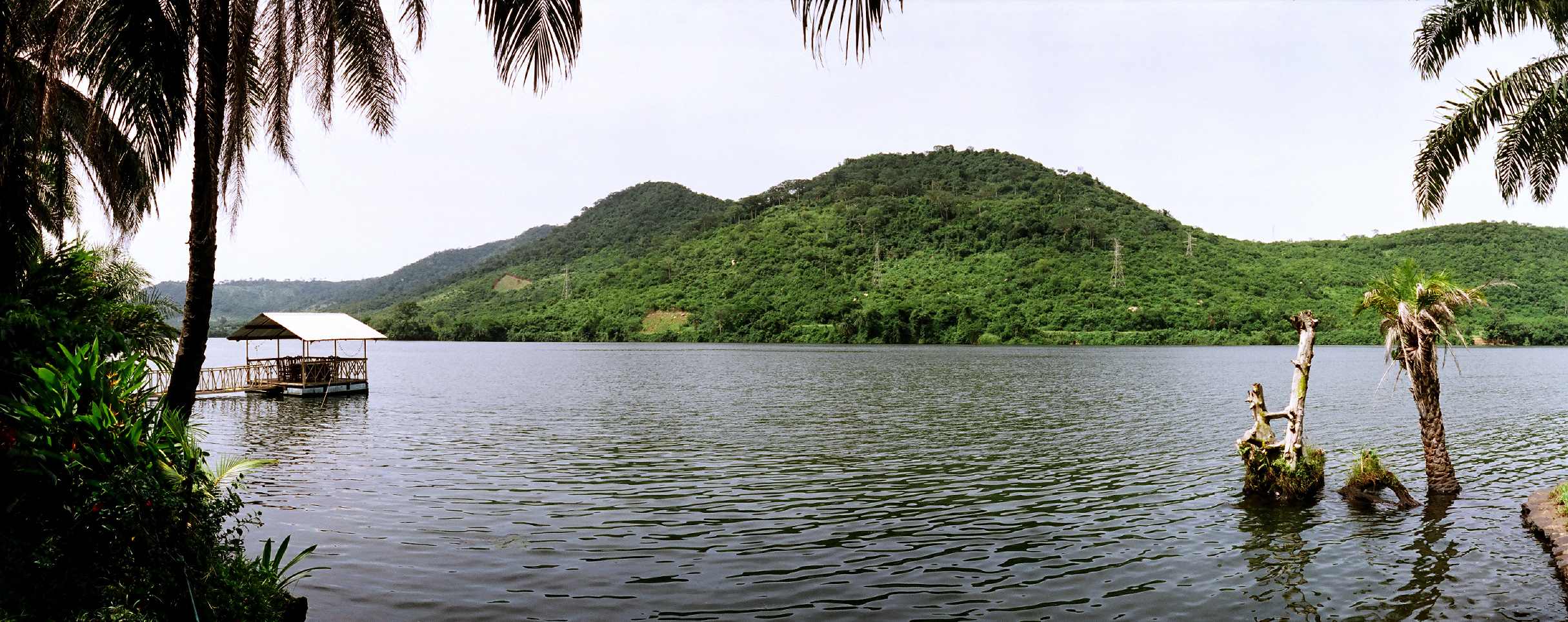 Volta River